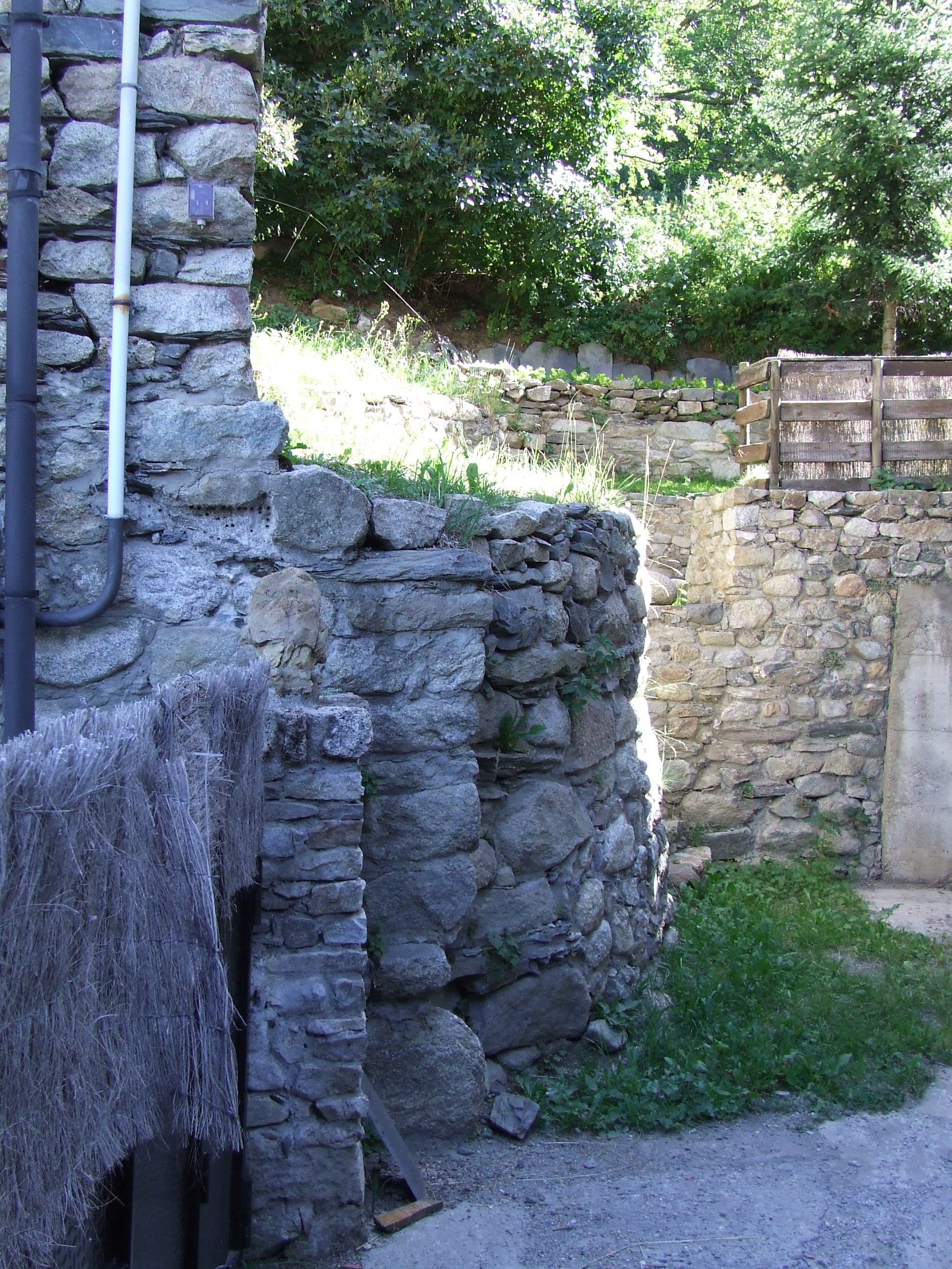 Sant Martí de Taüll (Vall de Boí, Alta Ribagorça)